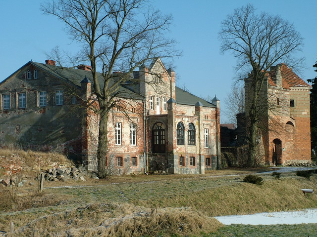 Dwór w Zamku Kiszewskim - 5 marca 2005